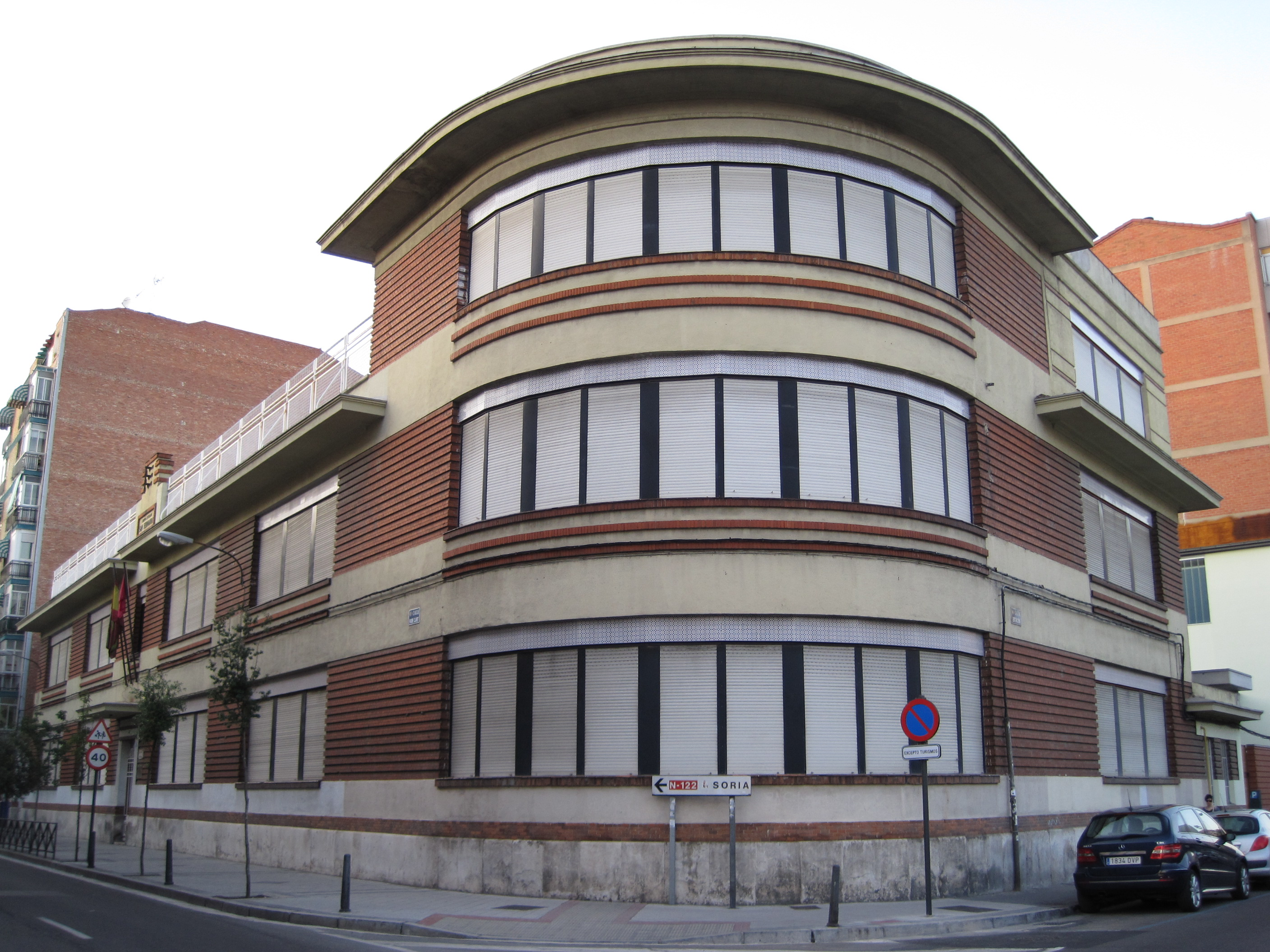 Vista del CEIP San Fernando, en el barrio de La Circular (Valladolid, España).